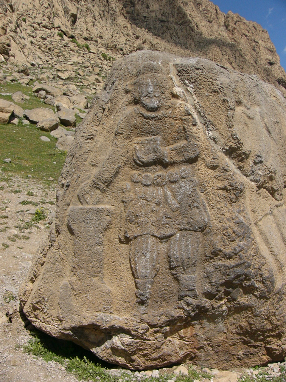 سنگ بلاش